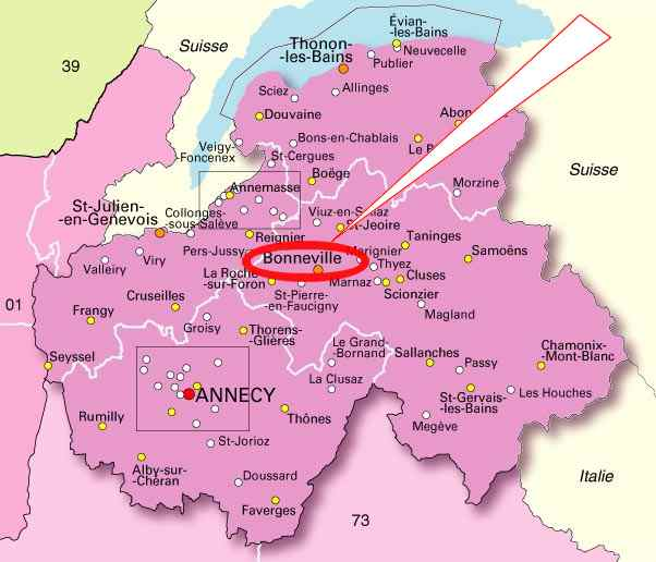 Carte de localisation de Bonneville